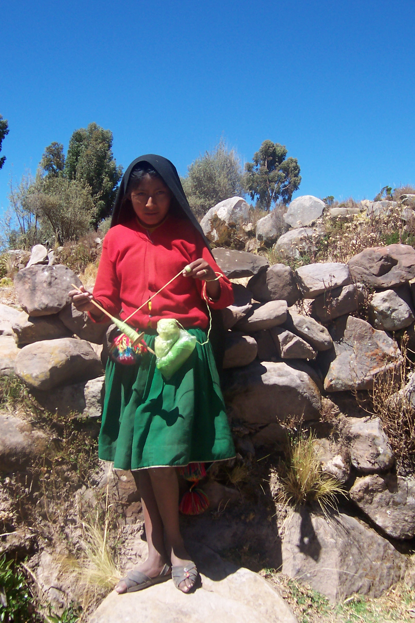 Taquile, Puno, Perú. Niña hilando Autor: Alfredobi Fecha: Agosto 2006